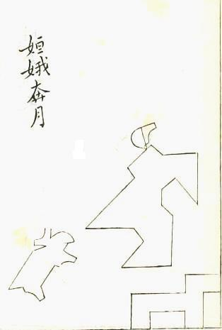 《益智圖》的嫦娥奔月